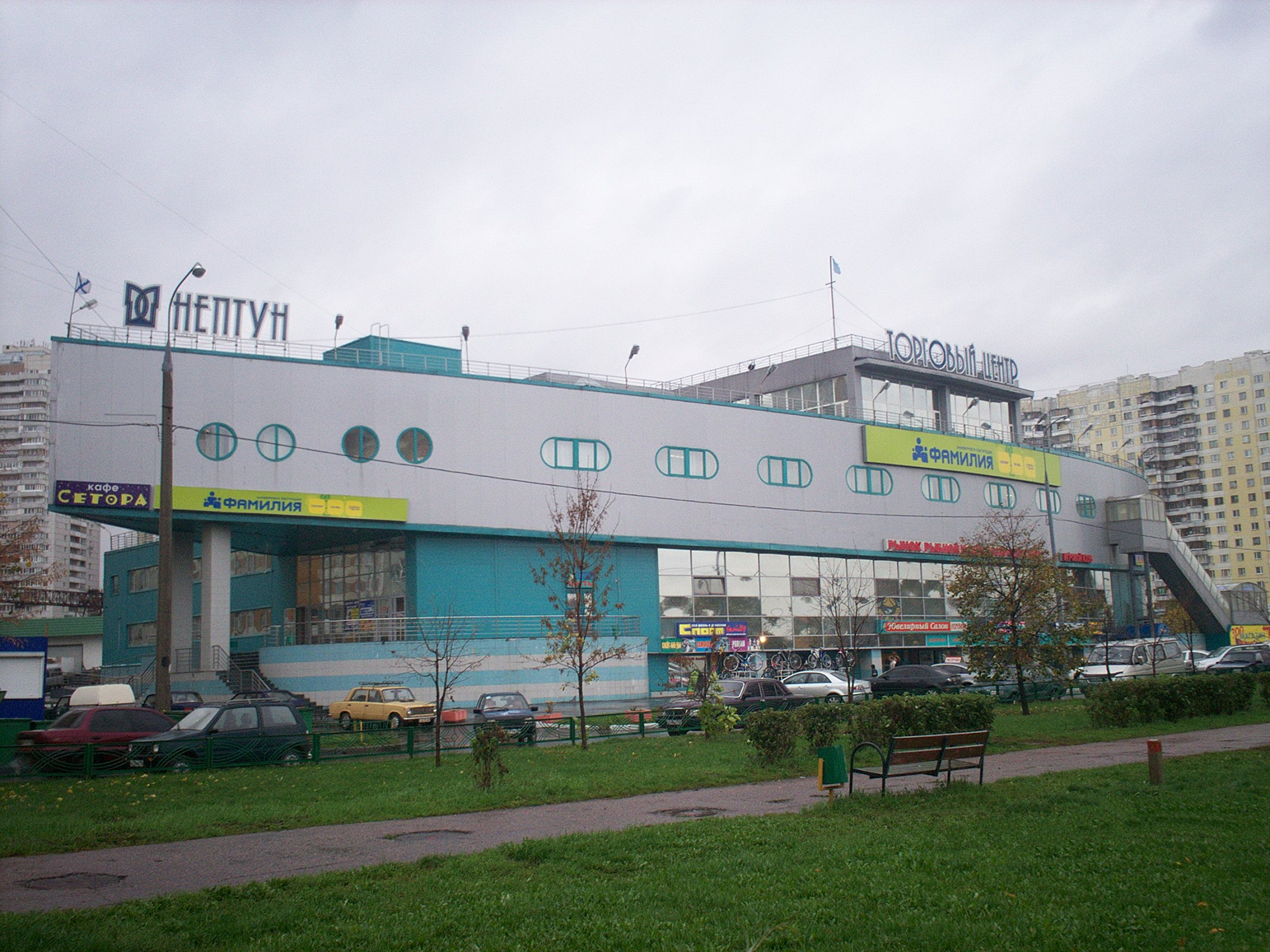 Торговый центр «Нептун» в районе Митино (г. Москва). Адрес по OSM (OldIvantey): Пятницкое шоссе, д. 39.